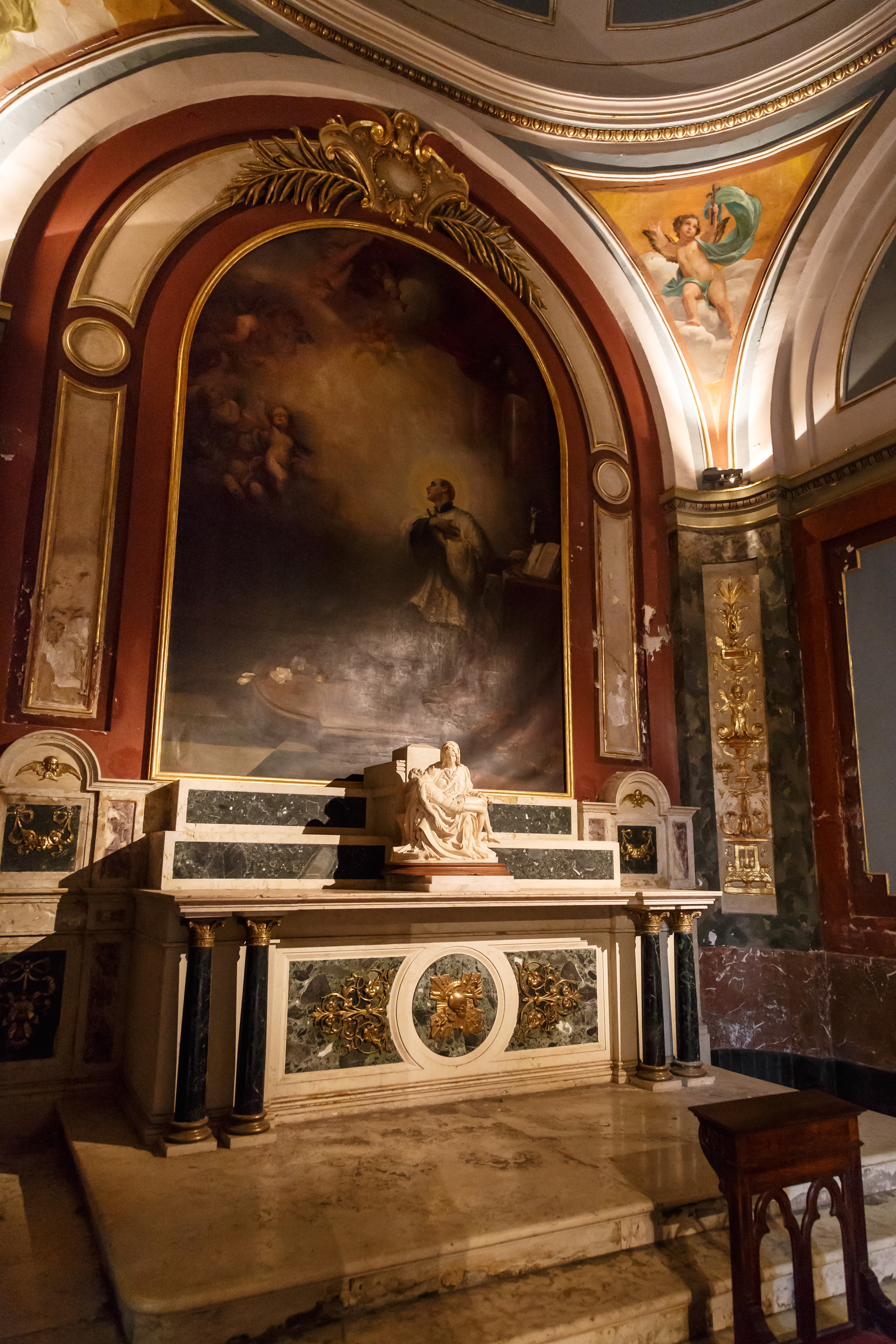 Interior de la Catedral Metropolitana de Buenos Aires. Capilla de San Luis Gonzaga.